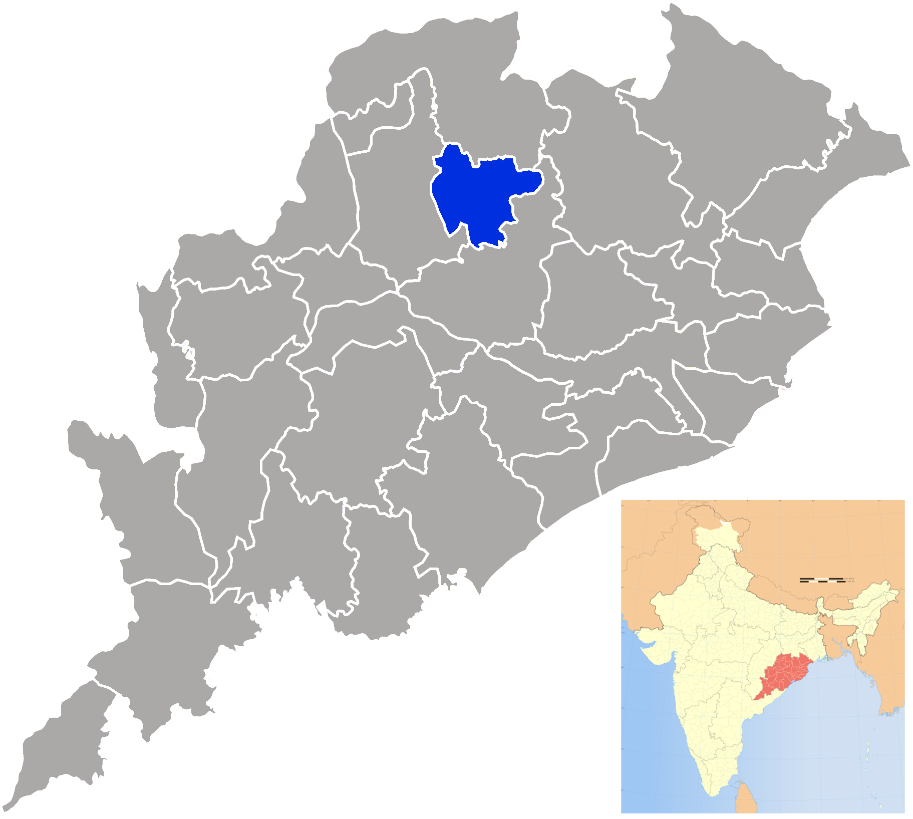 Deogarh district in Orissa